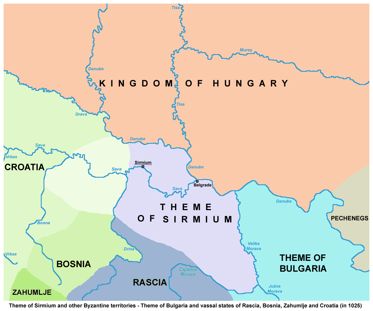 prepravljena po